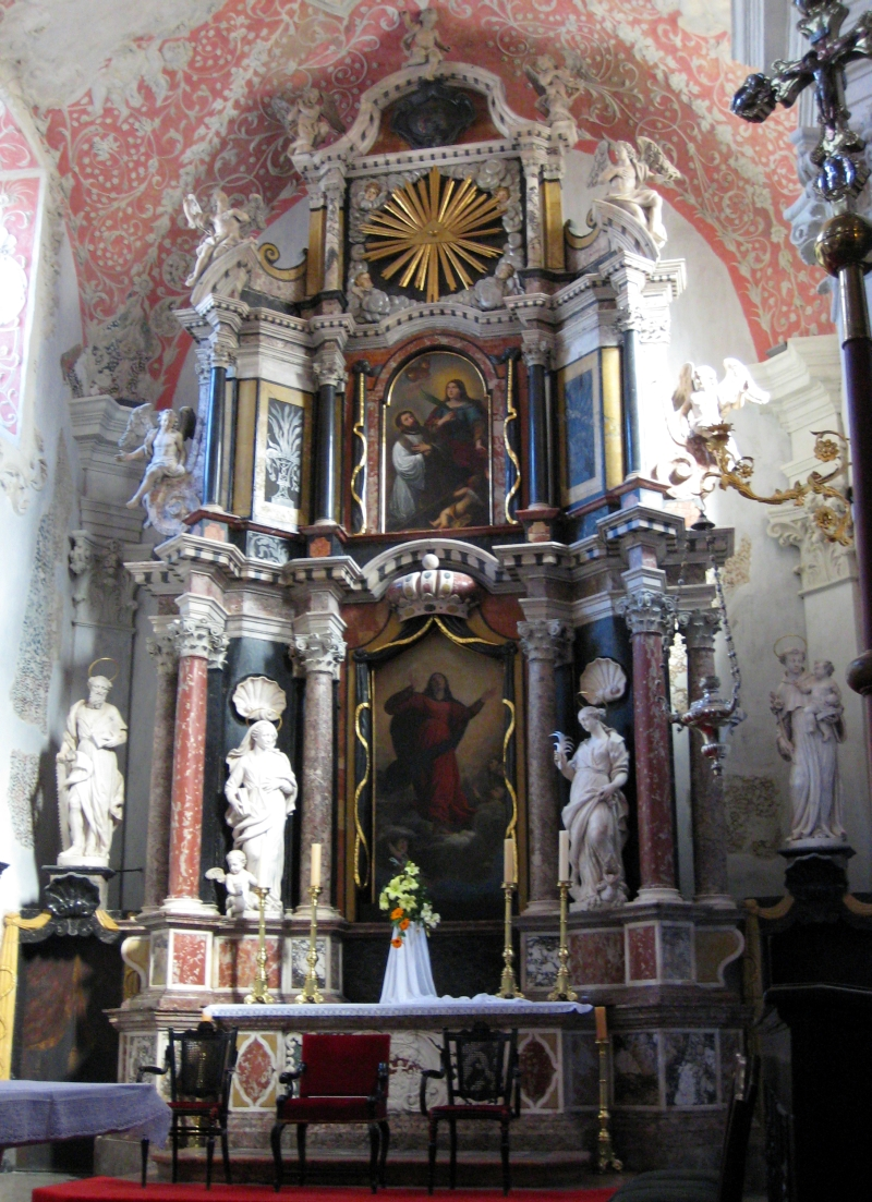 Crkva Uznesenja Blažene Djevice Marije, Rijeka